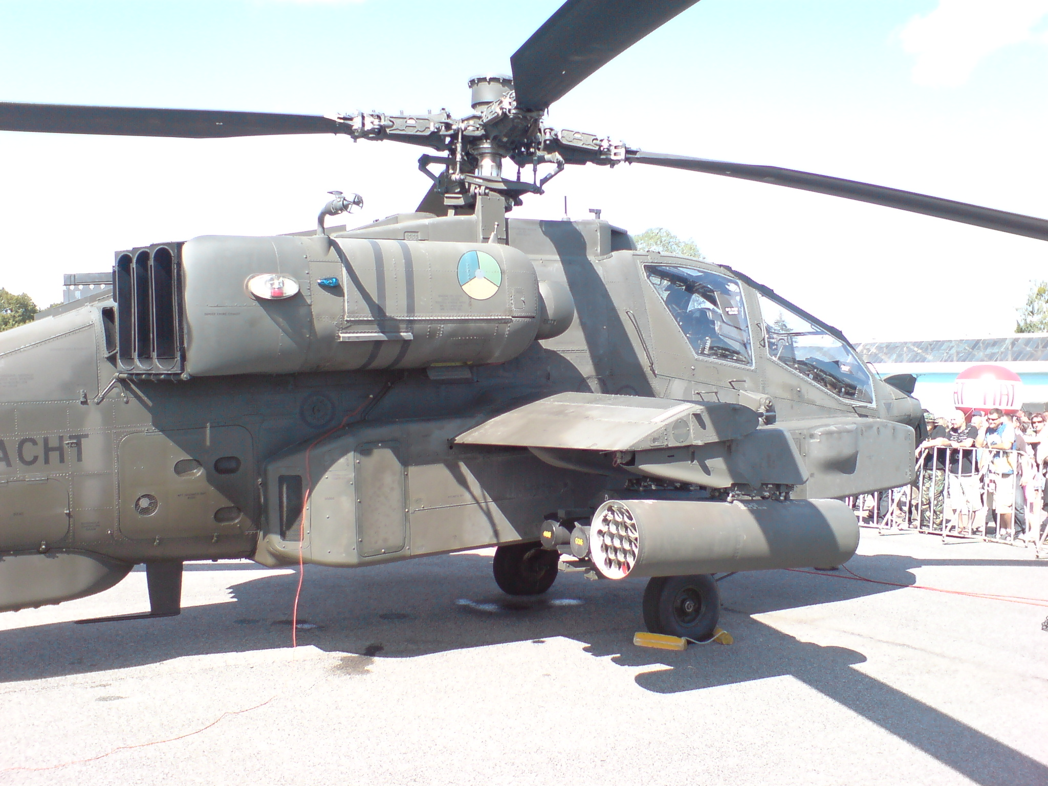 AH-64 Apache (Belgium) Radom